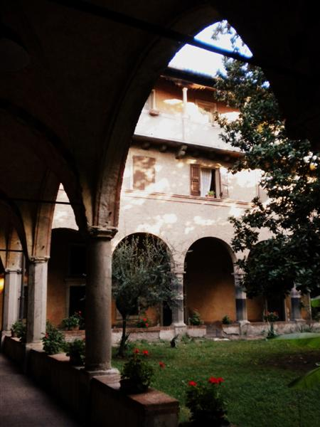 Chiostro della Chiesa di San Francesco Grande in Padova